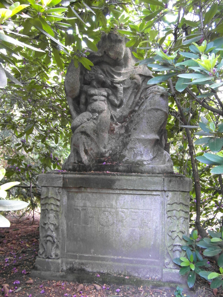 Wil Howard: Grabmal Paul Thorer (Rauchwarenkaufmann und -veredler), Südfriedhof Leipzig